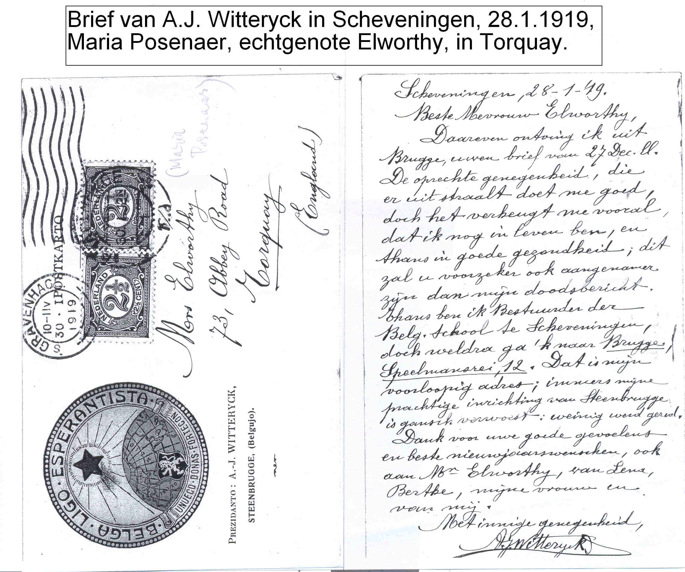 Postkaart van A.J. Witteryck (Scheveningen) aan Maria Posenaer, 1919.